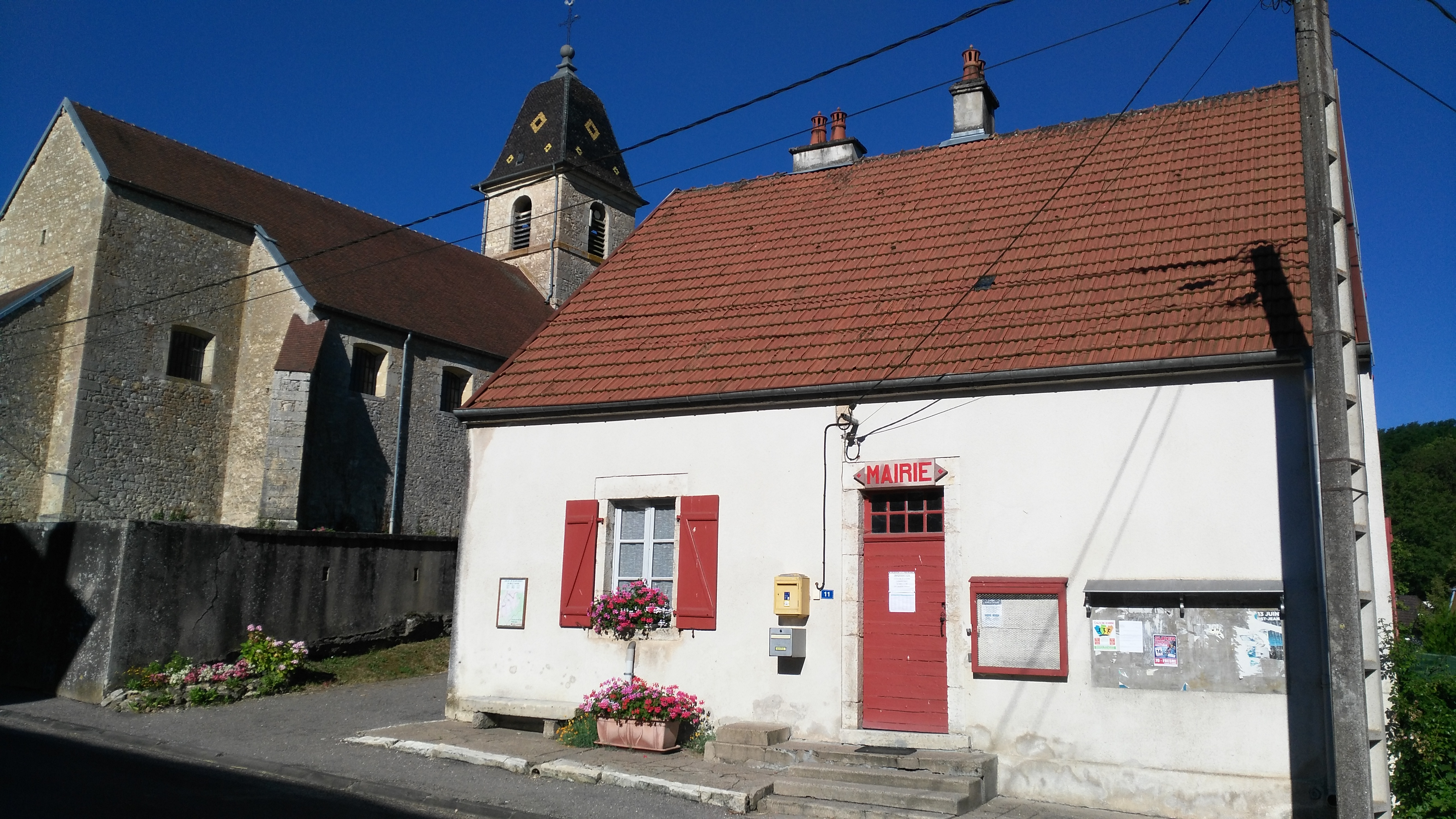 La Mairie